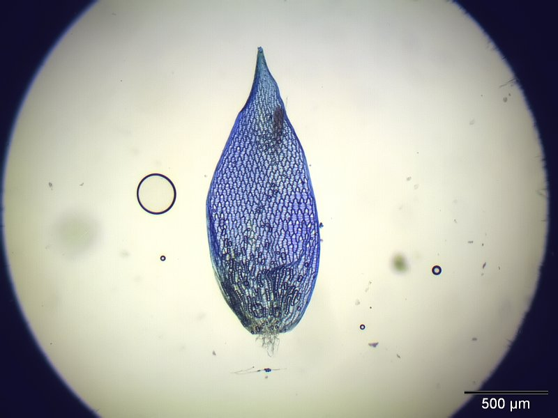 Ufer-Torfmoos (Sphagnum riparium), Astblatt, Vergrößerung: 40x